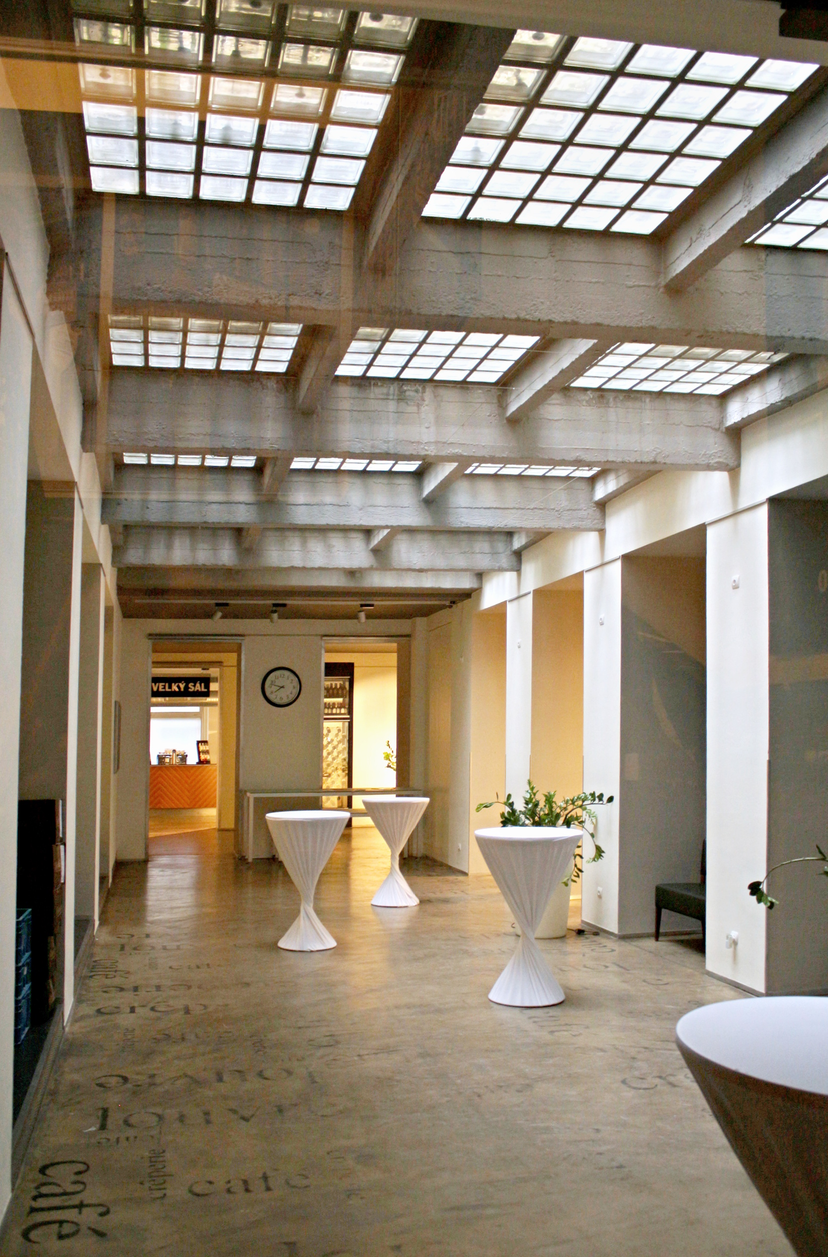 Pražská kavárna Café Louvre